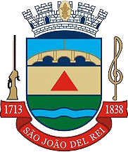 Coat of arms of São João del-Rei city in Minas Gerais, Brazil. All the images of Brazilian states' flags and coat of arms (official symbols) are in public domain. Brasão da cidade de São João del-Rei em Minas Gerais, Brasil. Todas as imagens de bandeiras de estados brasileiros e brasões (símbolos oficiais) estão em domínio público.